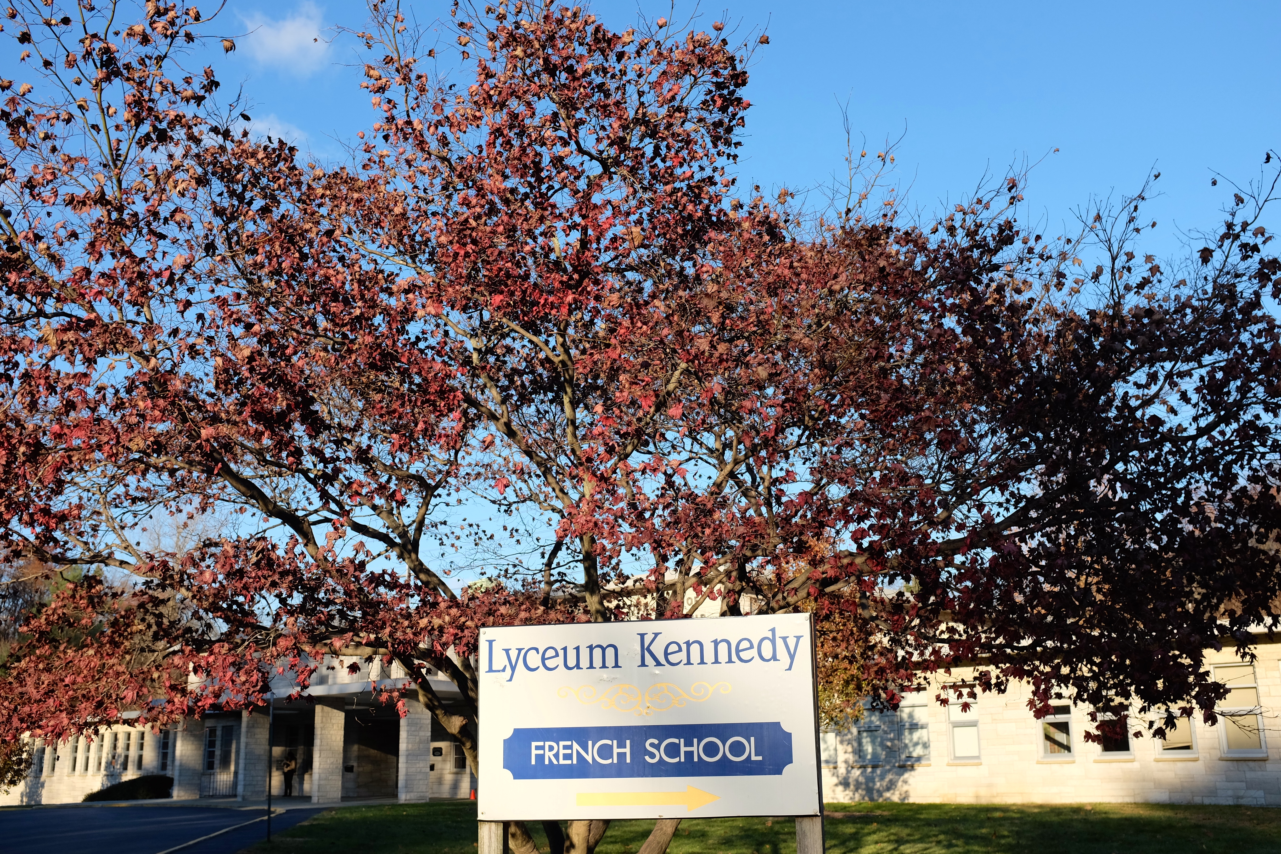 Campus d'Ardsley 2